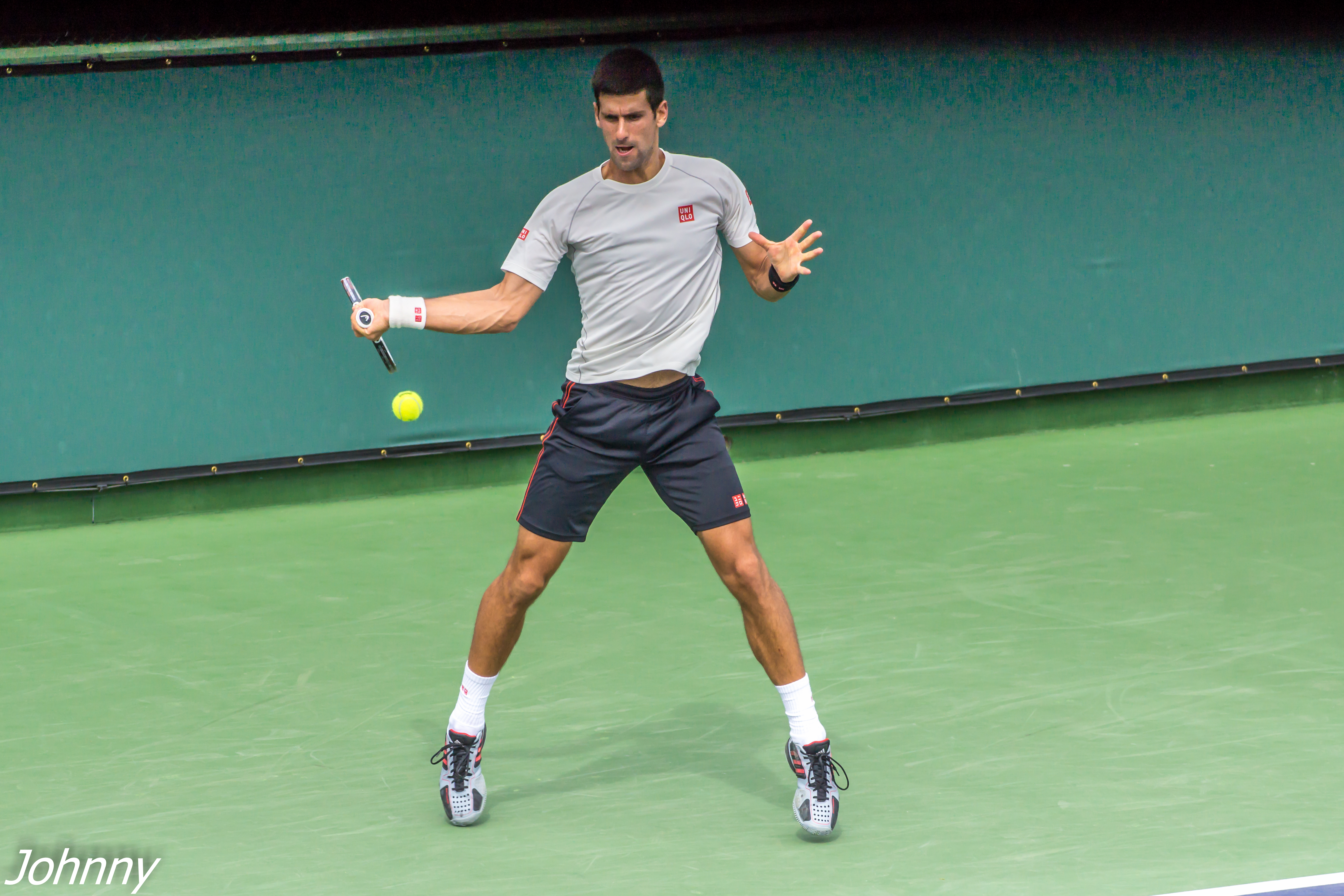 Srpski (latinica): Trening sa Vajdom